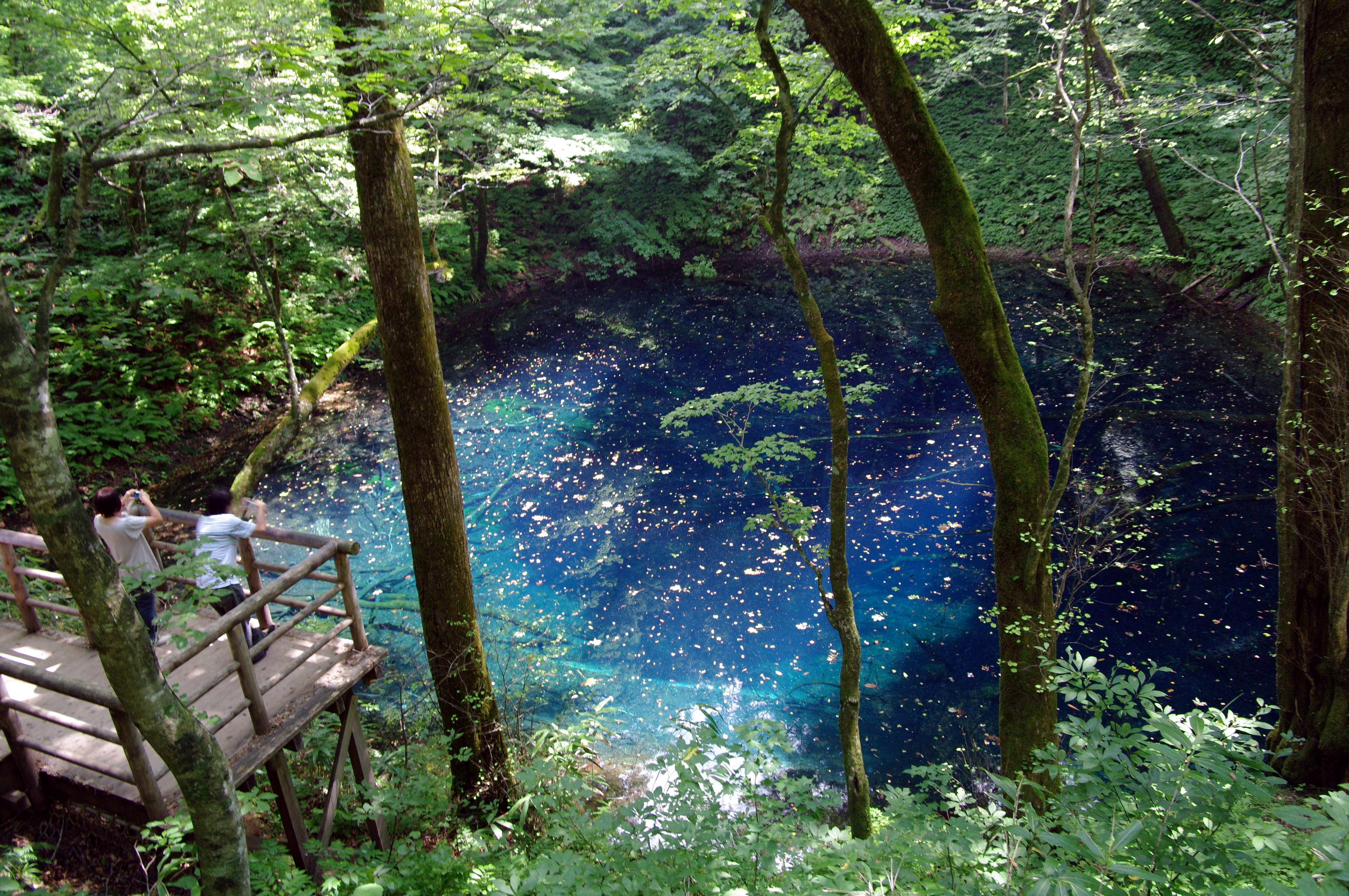 青池